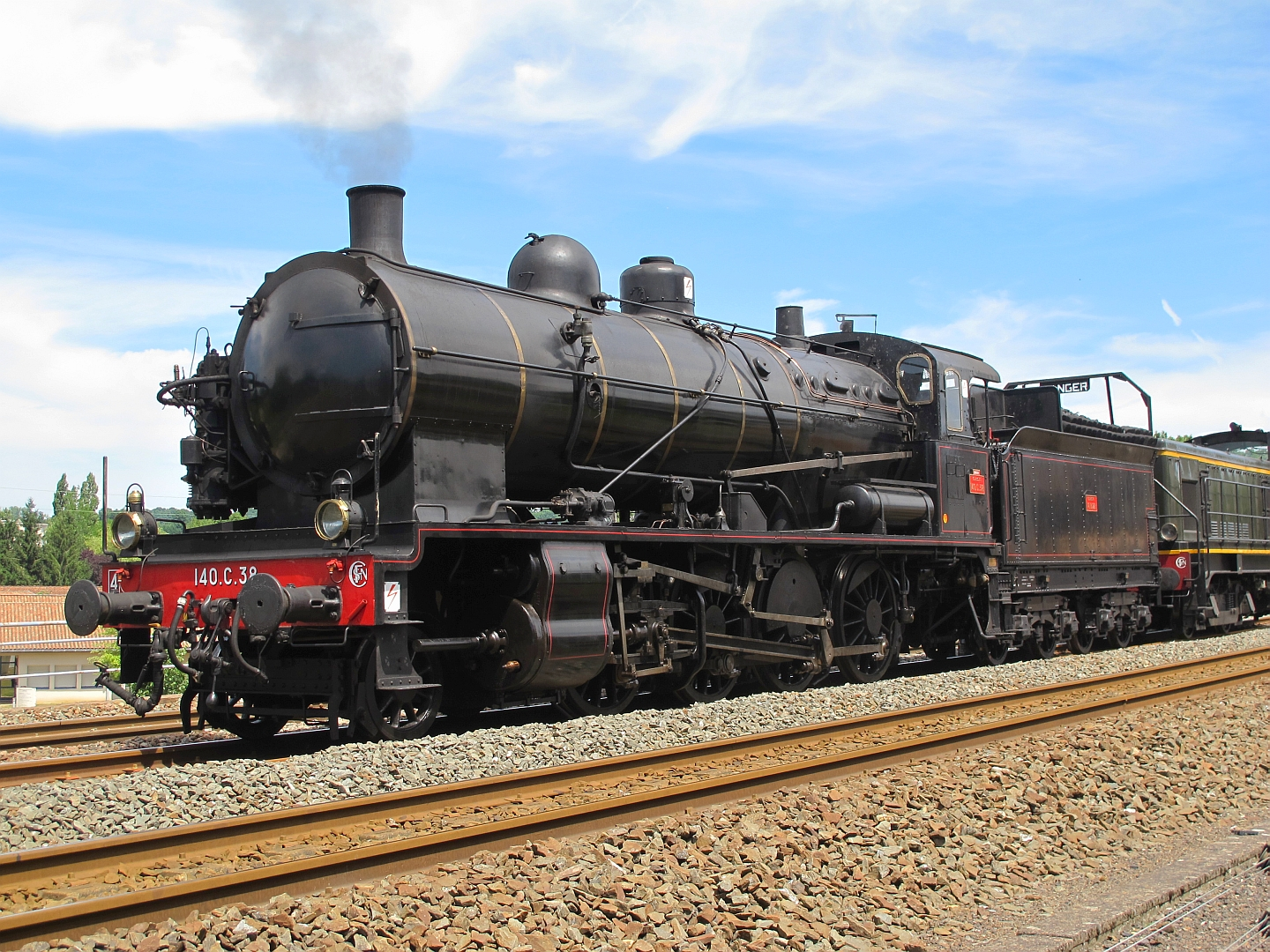 La locomotive 140 C 38 du Chemin de Fer Touristique Limousin Périgord en gare de Thiviers (Dordogne) le 12 juillet 2015.